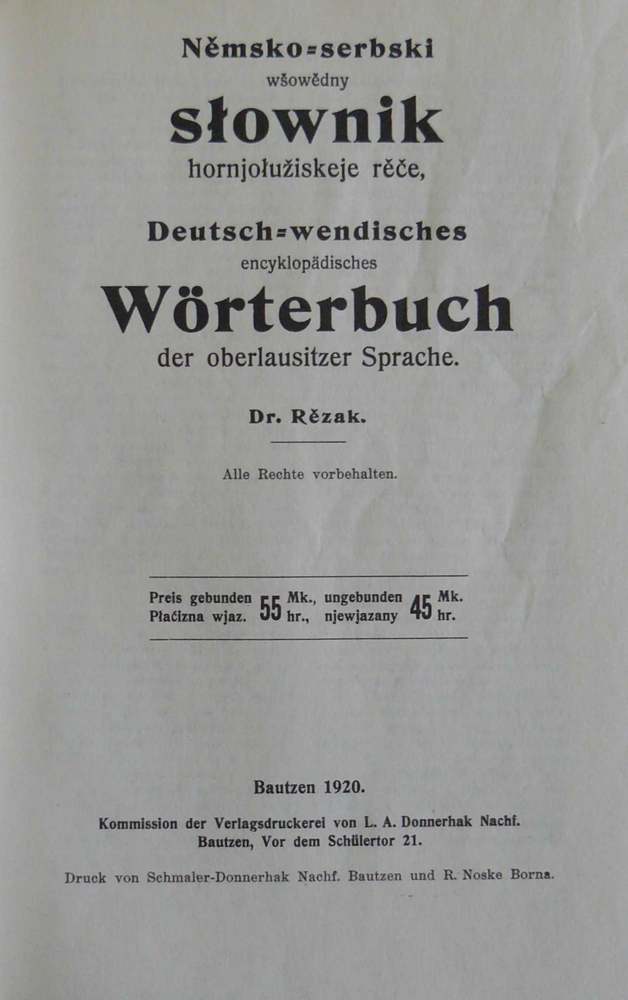 Titelbild der Ausgabe 1920 von Filip Rězaks Wörterbuch